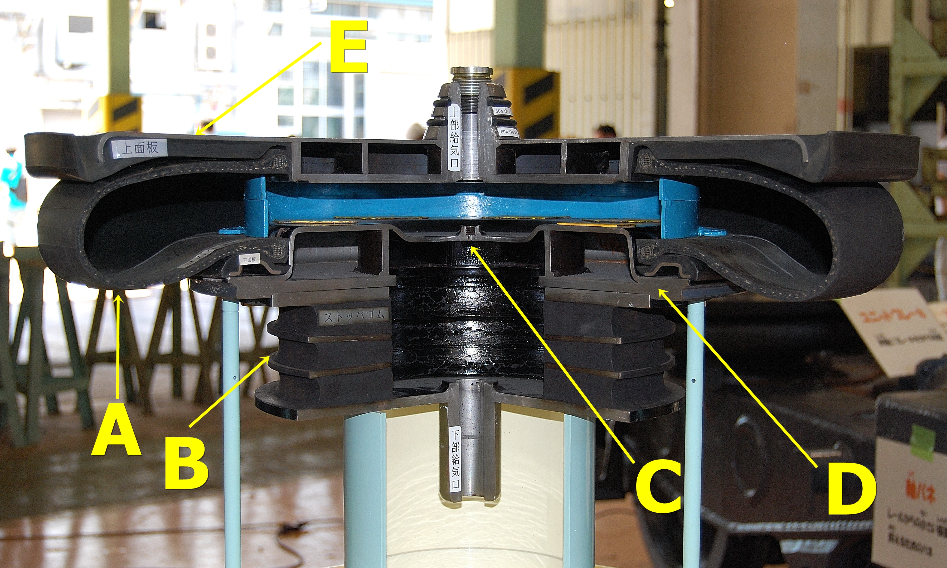 Japan language: diaphragm bolsterless bogie with air cut-away model of the spring, A diaphragm-B laminated rubber and C is Aperture holes and D under the face plate and E top plate is. (Summer fairs and events in the JR Tokyo general vehicle Center open during shooting)